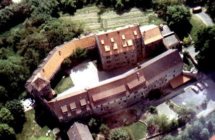 Akademie Burg Fürsteneck in Eiterfeld, Hessen, Germany